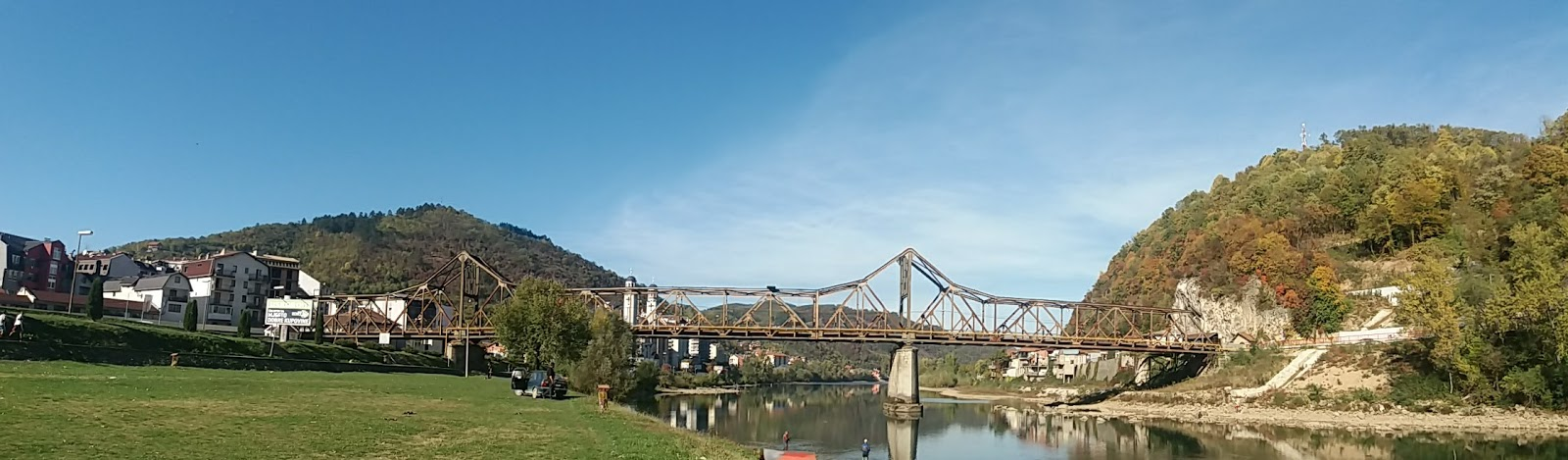 Мост краља Александра Првог Каеађорђевића